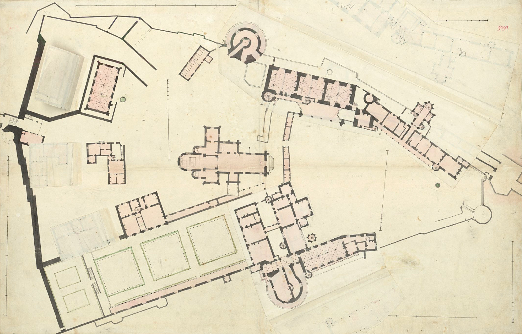 Plan von Schloss Amboise, erste Etage